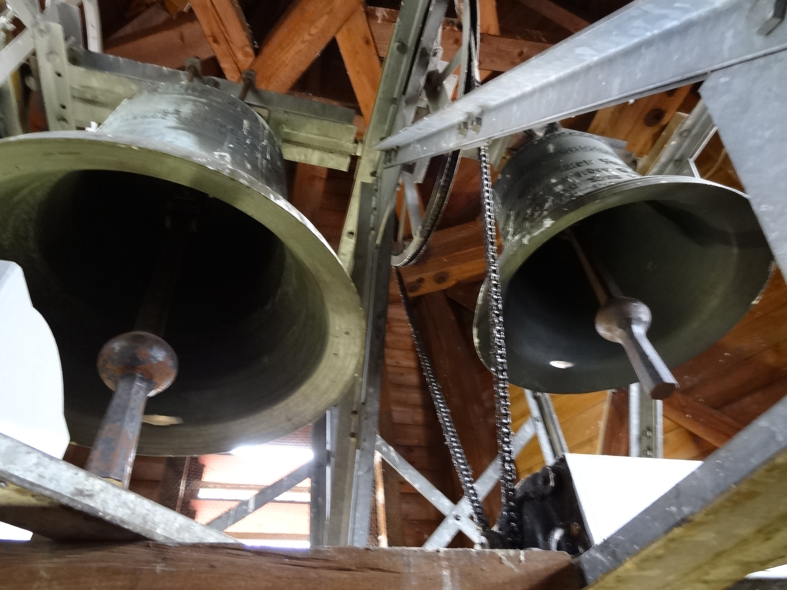 Evangelische Kirche Pohl-Göns